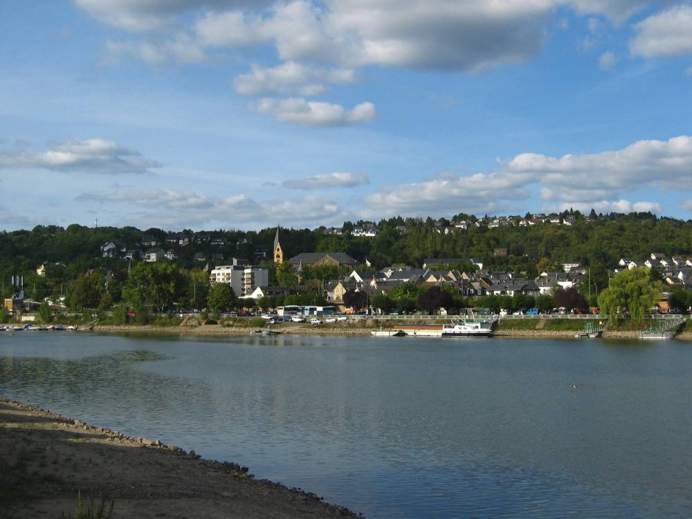 Vallendar von der Insel Niederwerth aus photografiert